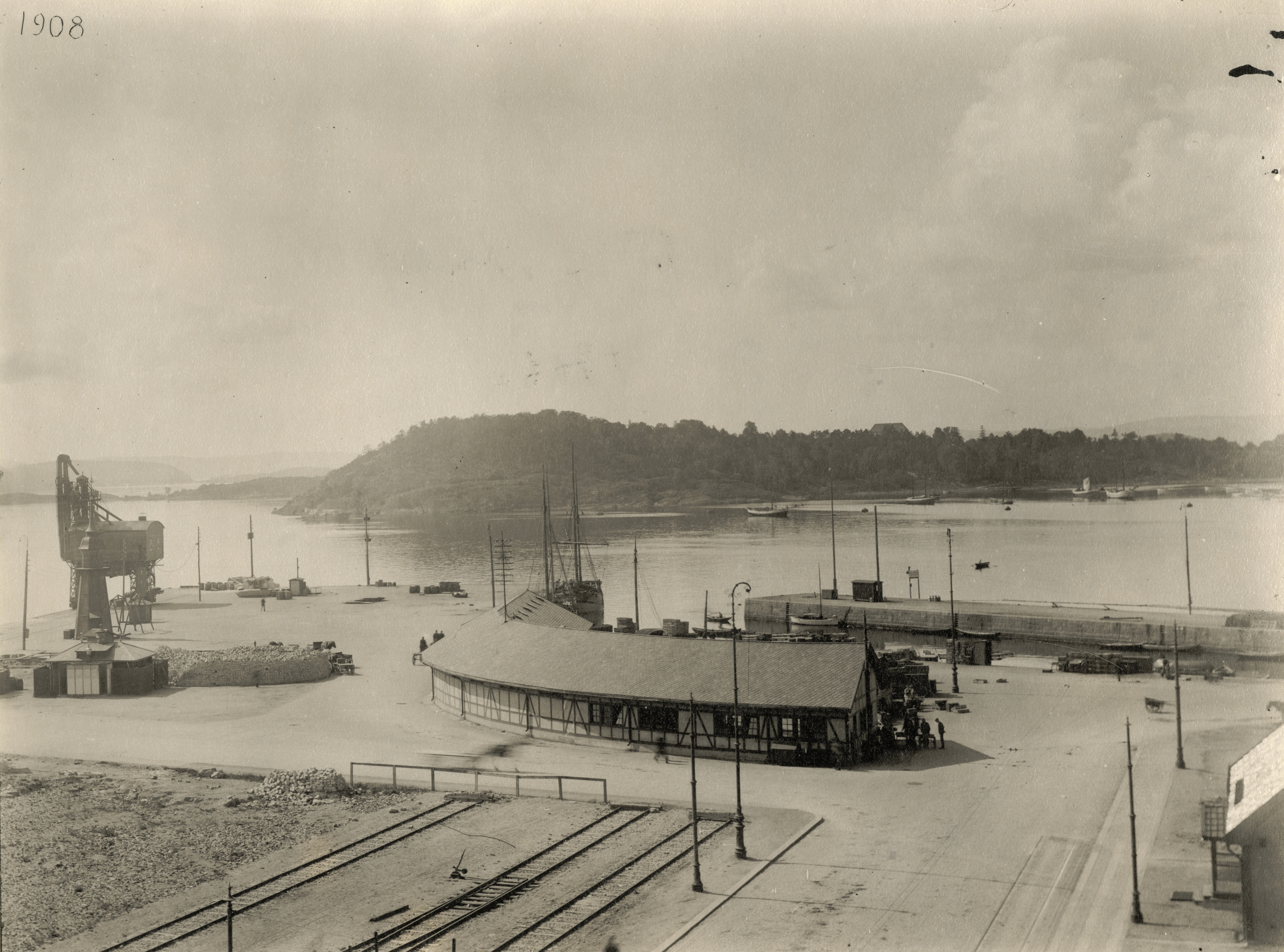 Oslo havn, Vippetangen i Oslo, Oslo Utstikker III, 1908.